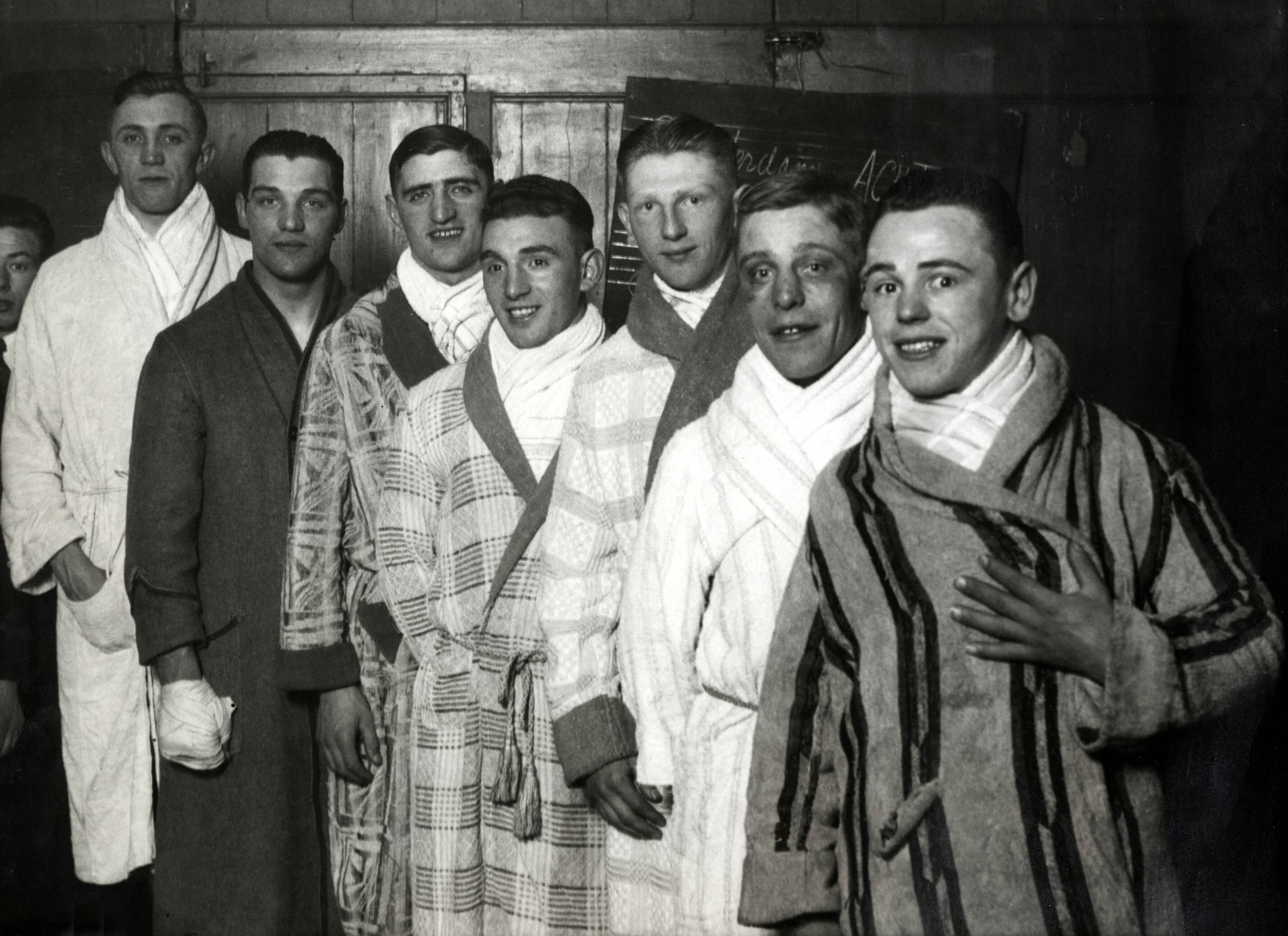 Boksen, Amateur bokswedstrijden om de kampioenschappen van Nederland, in het algemene verkooplokaal 9 mei 1932 in Rotterdam. Een rij kampioenen van voren naar achter: Martinus "Tinus" Lambillion (vlieggewicht), Jan Nieuwenburg (bantamgewicht), Jan Nicolaas (vedergewicht), Rieger (lichtgewicht), Ben Bril (weltergewicht), Jan Kiks (halfzwaargewicht), Wigman (middengewicht).